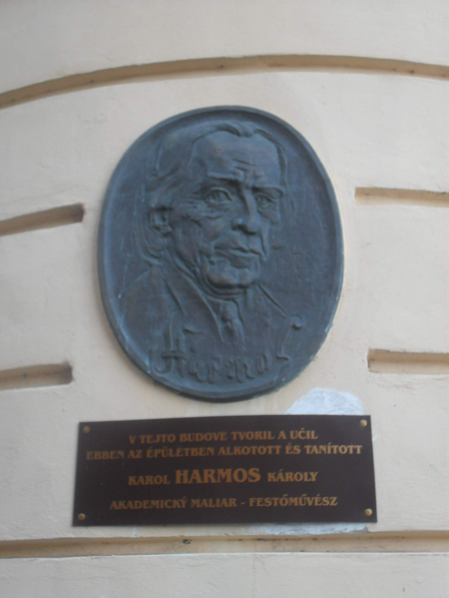 Komárom - Harmos Károly emléktáblája a Duna Menti Múzeum falán